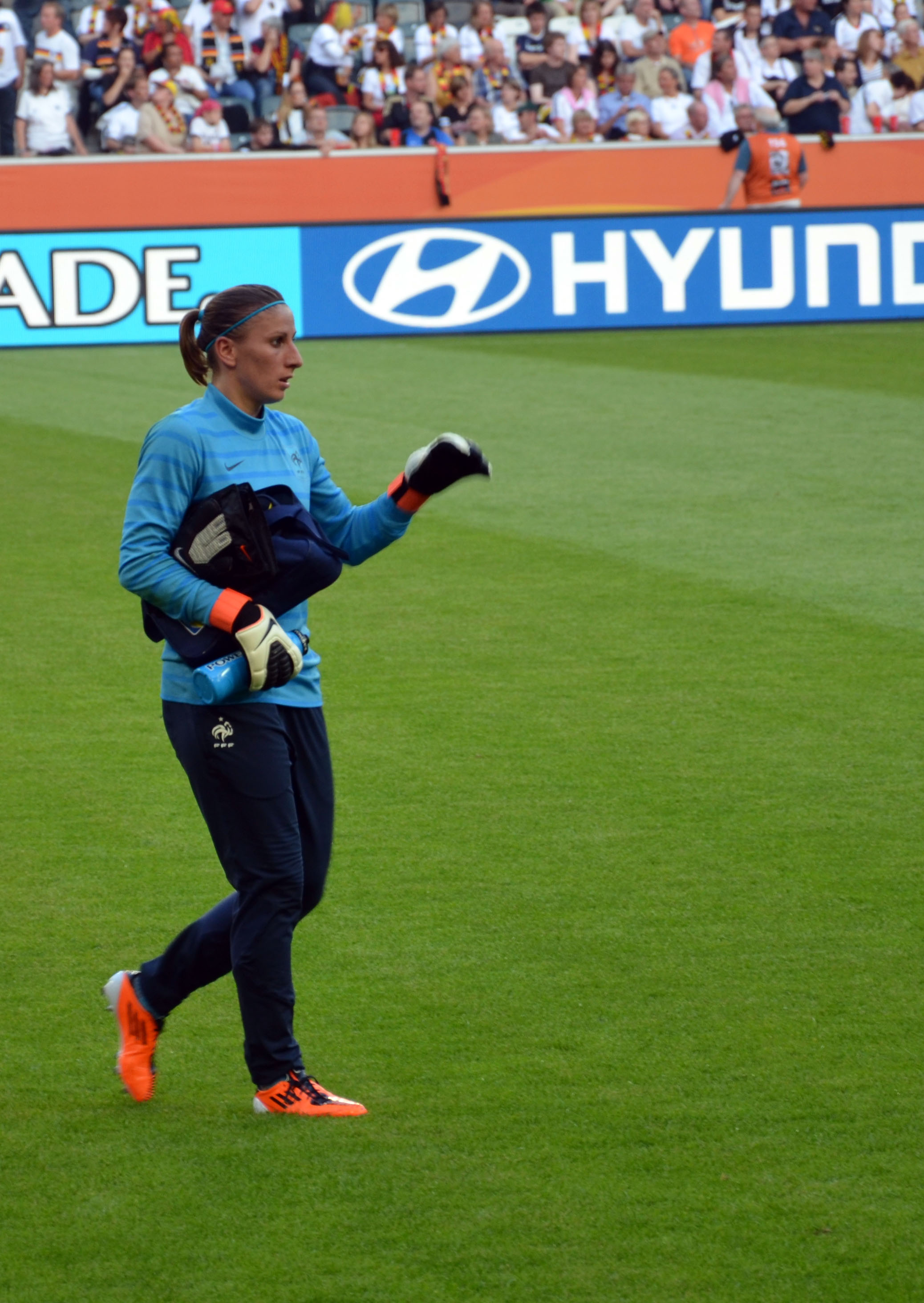 WM Vorrundenspiel zwischen Frankreich und Deutschland am 5. Juli 2011 im Borussiapark in Mönchengladbach